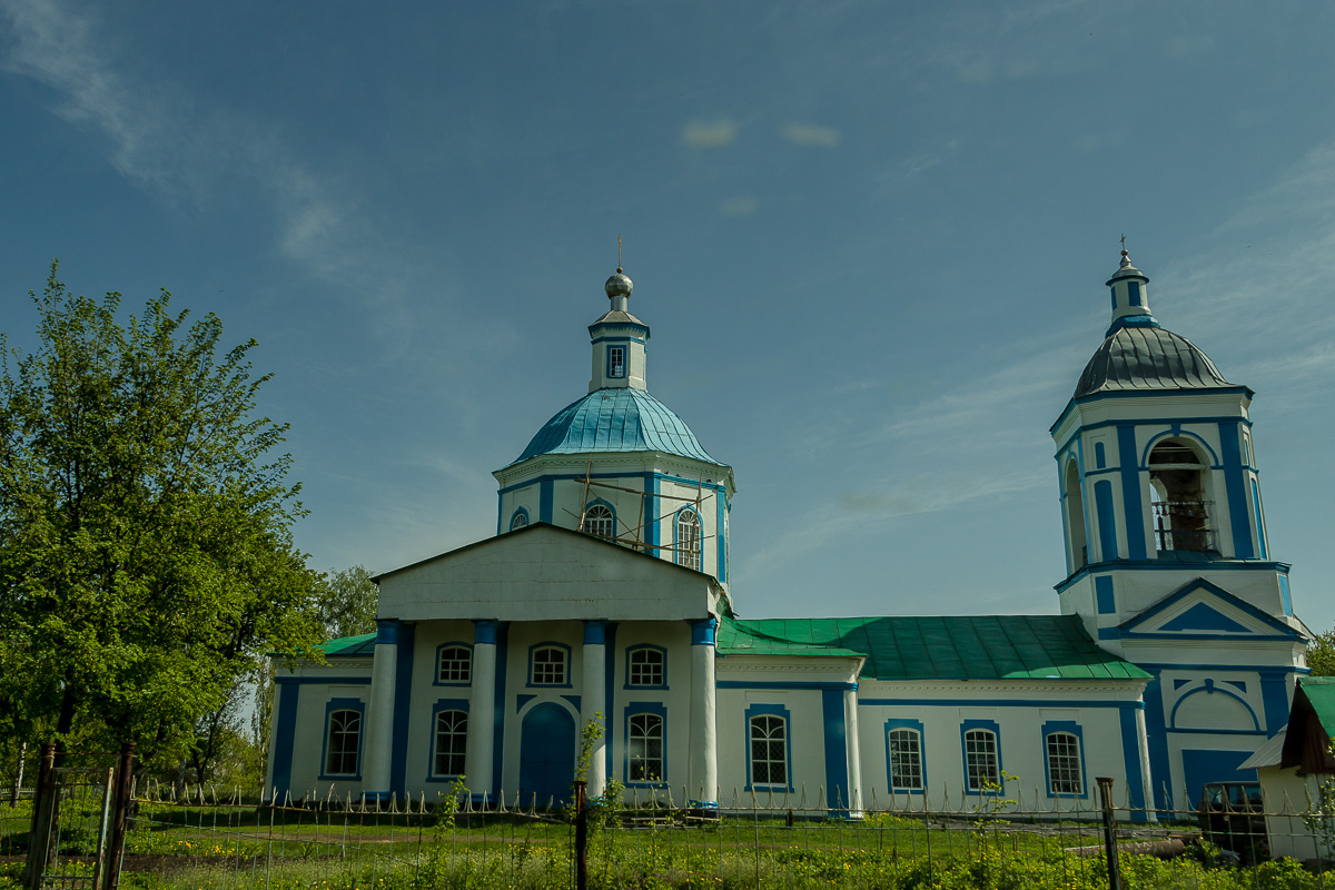 Троицкая церковь: Старая Ольшанка, Семилукский район, Воронежская область